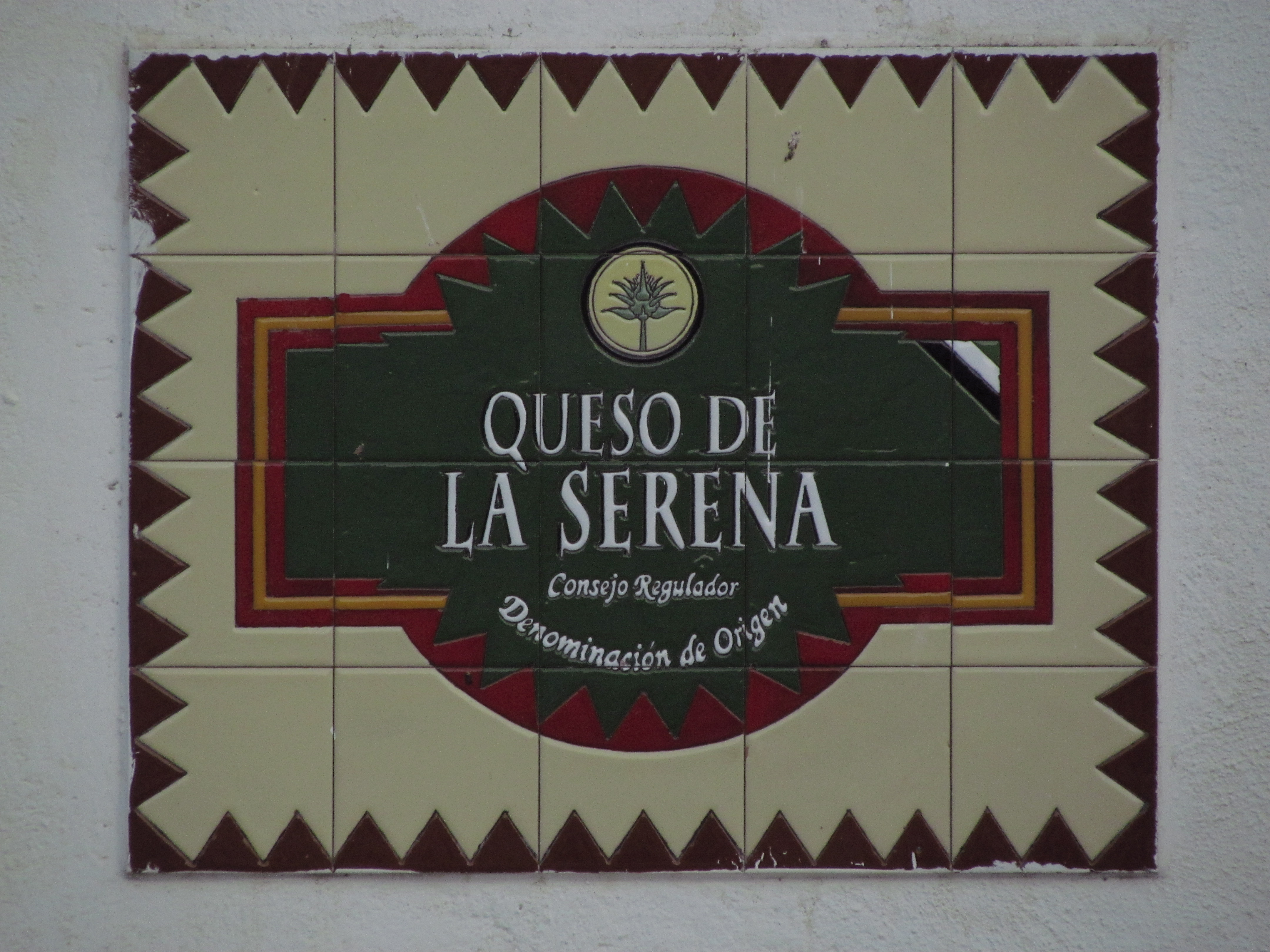 Conjunto de azulejos que indican la denominación de origen del Queso de la Serena en una fábrica/almacen de quesos en Quintana de la Serena.